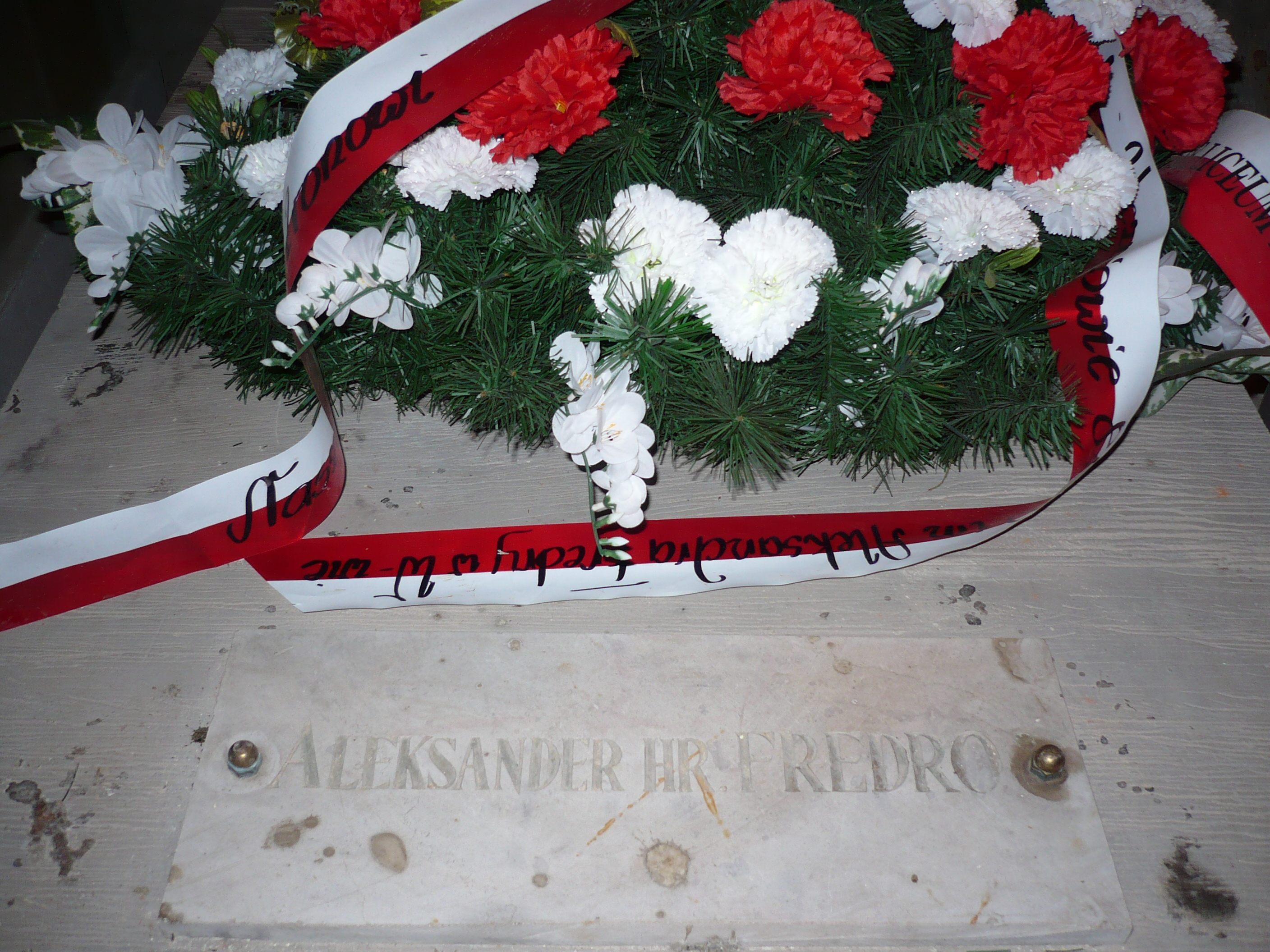 Nagrobek A. Fredro w krypcie kościoła